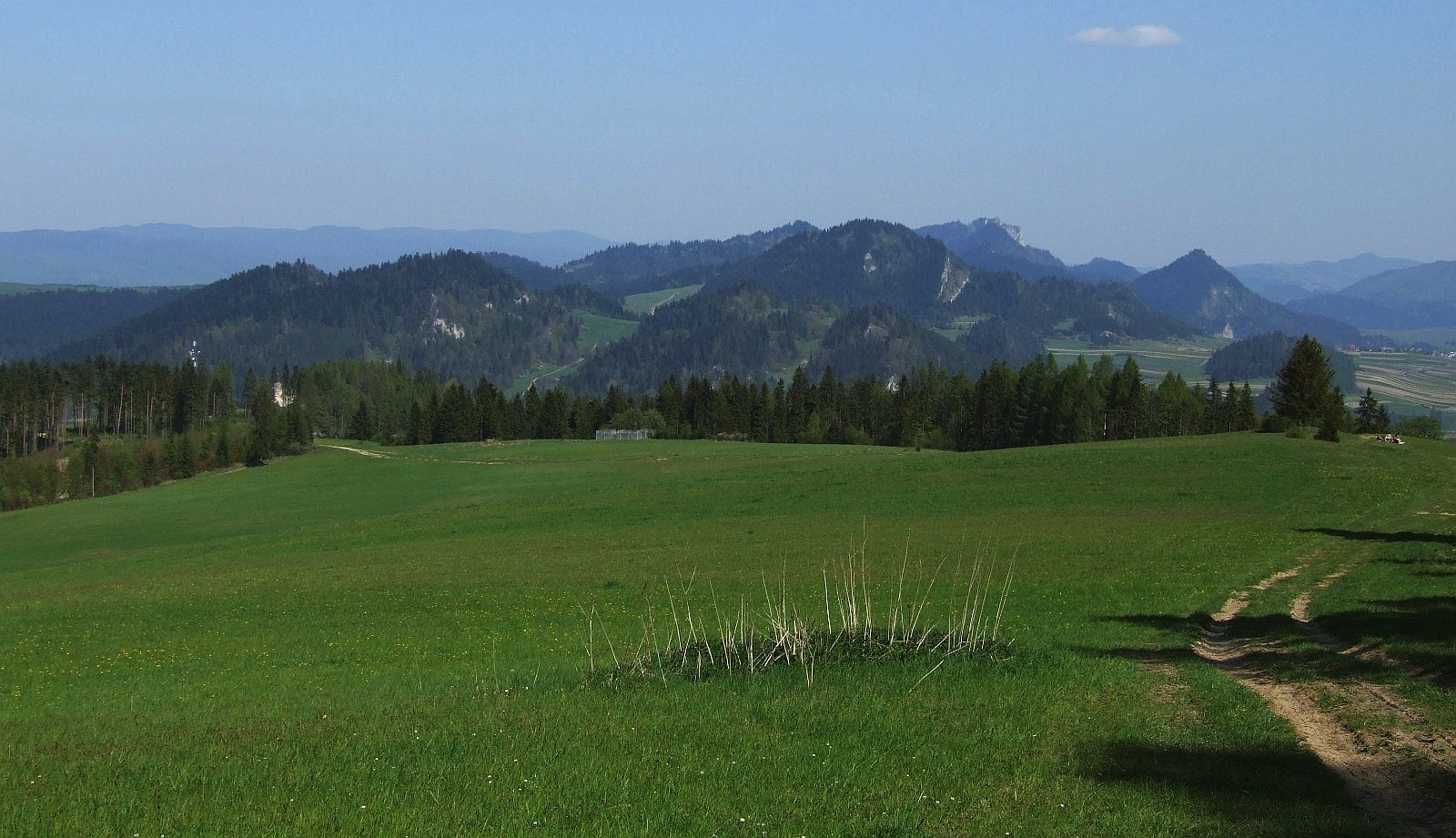 Widok z polany Cisówka w Pieninach Spiskich na Pieniny Właściwe